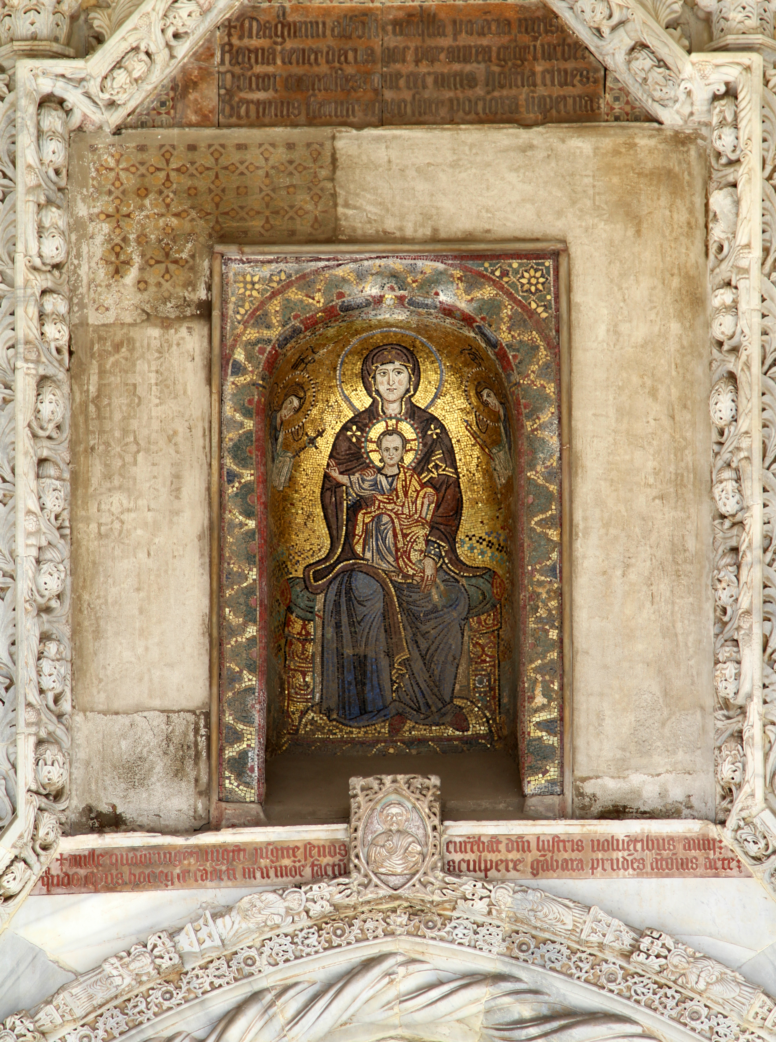 Madre di Dio Platytera nel portale della Cattedrale di Palermo.